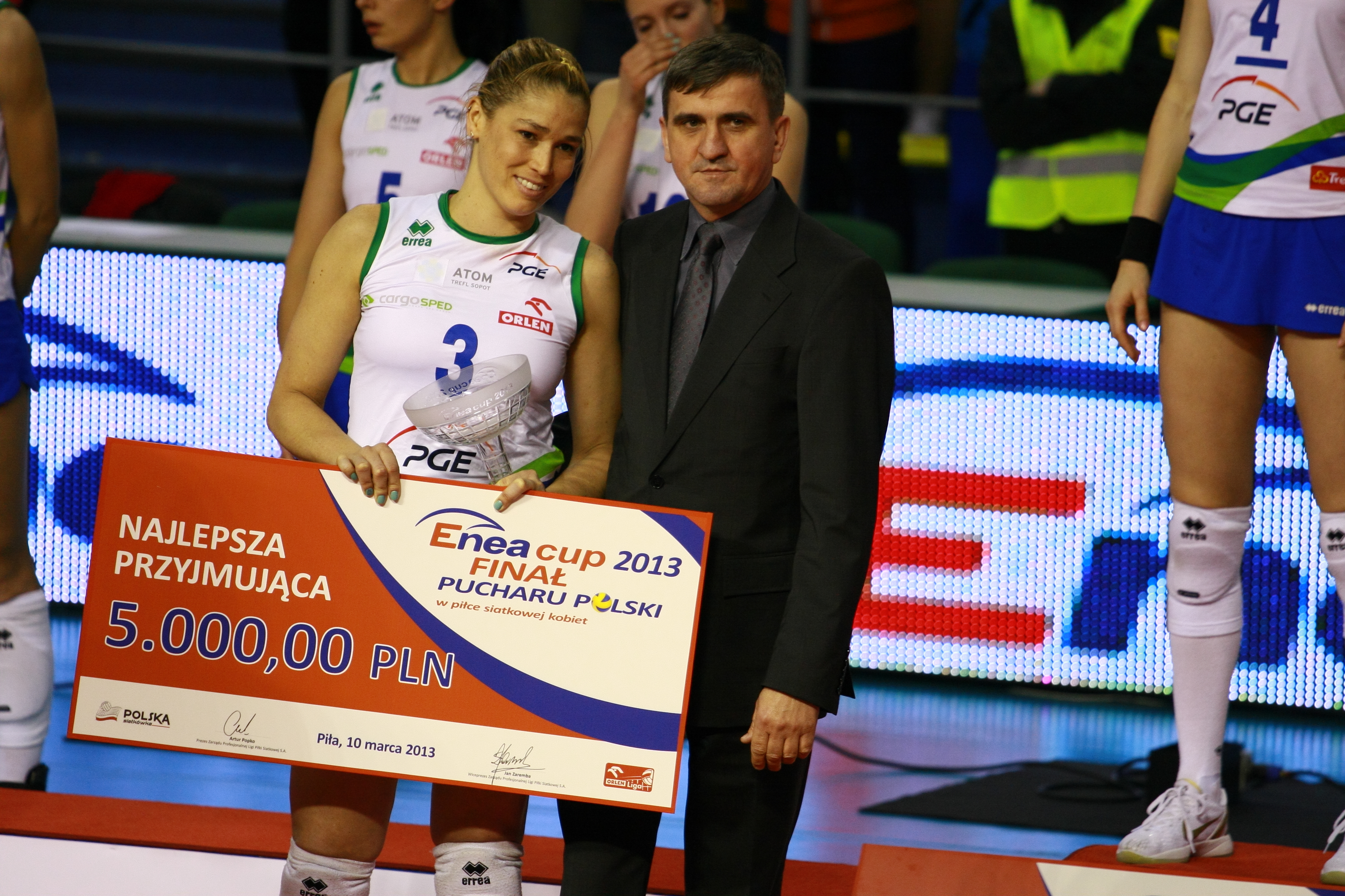 Atom Trefl Sopot Bank BPS Muszynianka Fakro Muszyna Tauron MKS Dąbrowa Górnicza Impel Gwardia Wrocław